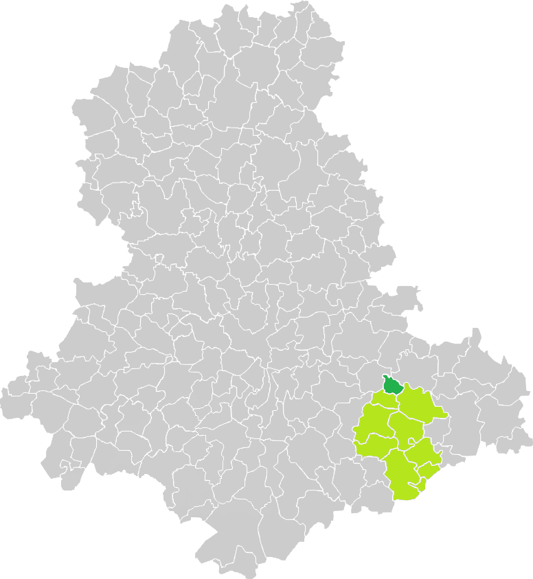 Carte de situation de la commune de Masléon (en vert foncé) dans le votre Canton (en vert clair) sur une carte des communes de la Haute-Vienne